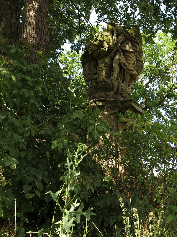 Sousoší svatého Jana Nepomuckého s andělem, u kostela, Platěnice.